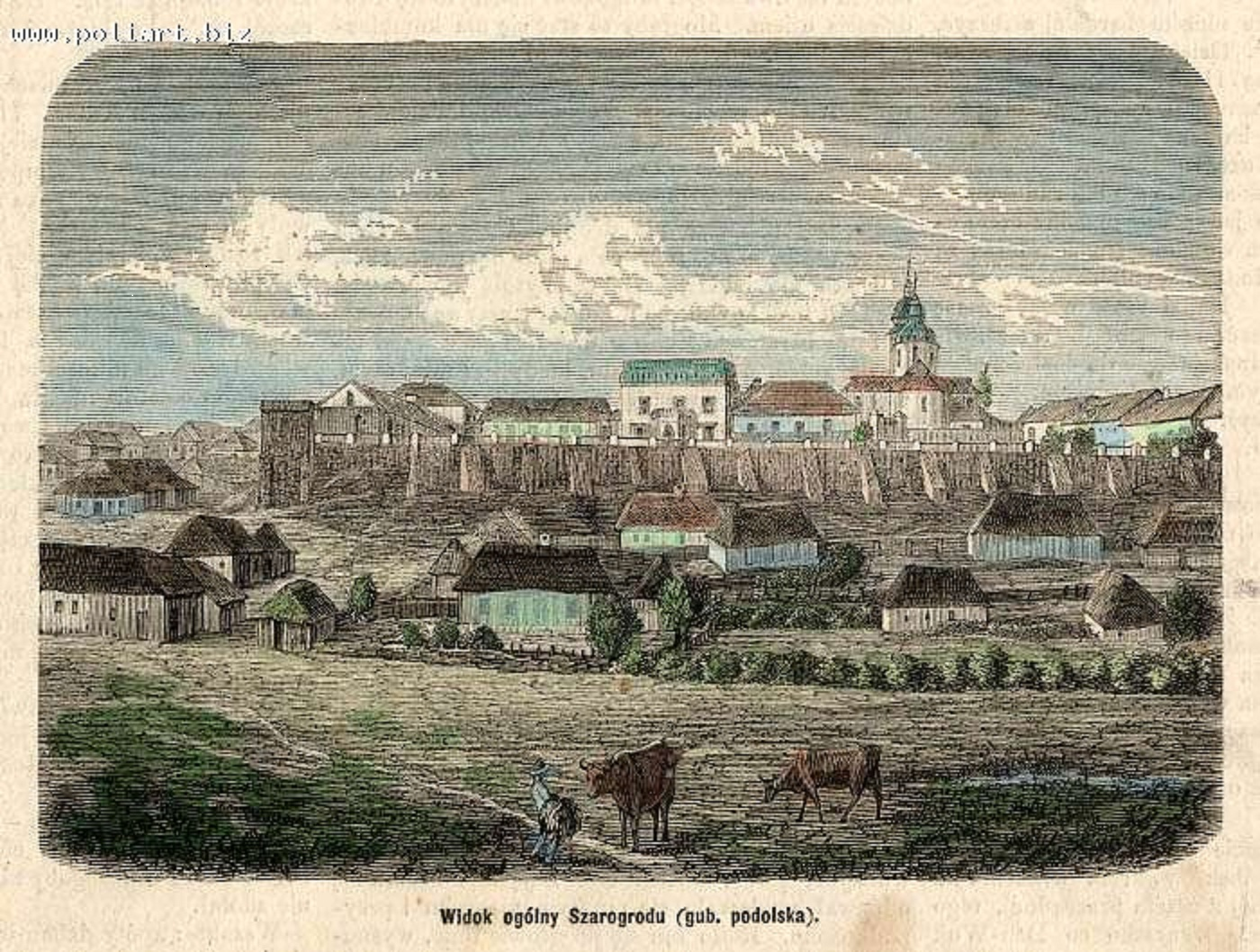 Szarogród - widok ogólny miasta